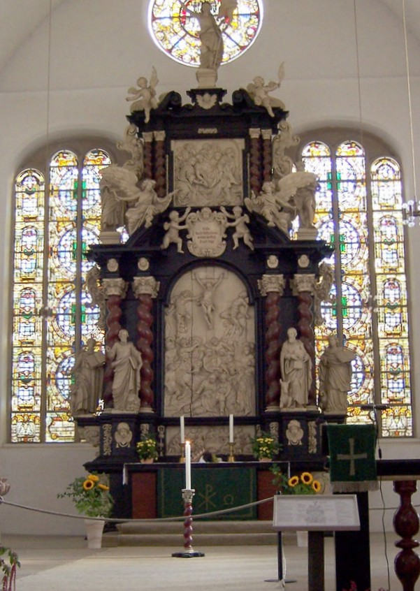 Stade, Kirche St. Cosmae (13.Jh), Hauptaltar von Christian Precht 1677